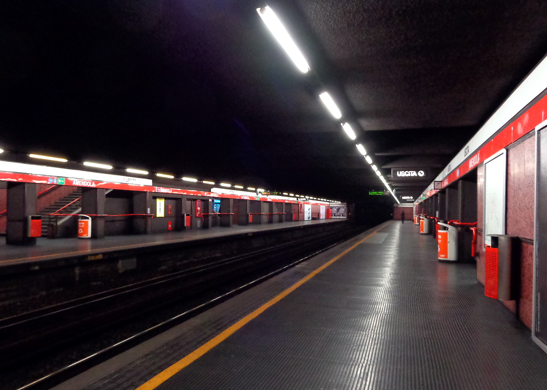 Stazione di Amendola della metropolitana di Milano